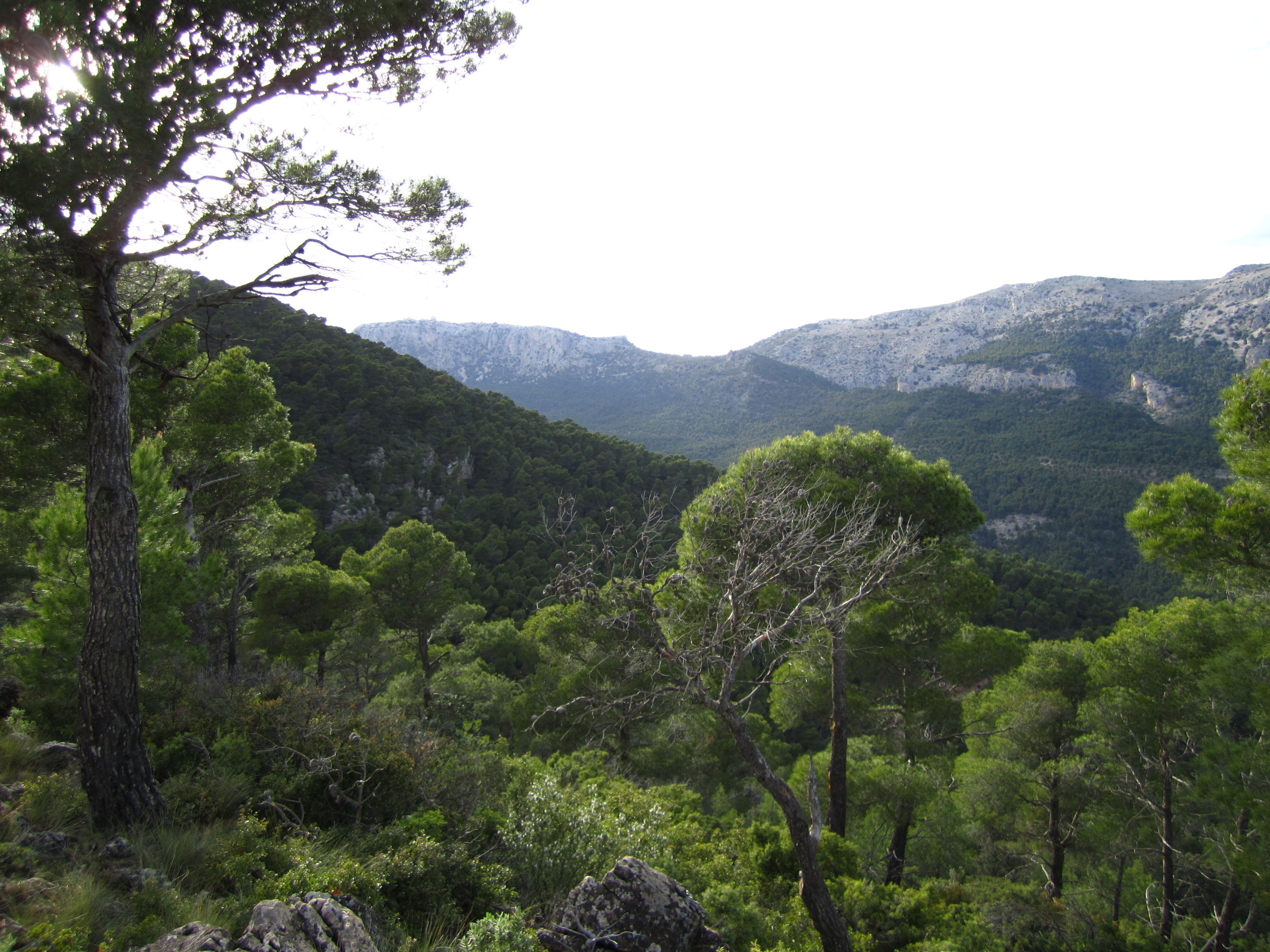 2011-04-22 Sierra Espuña